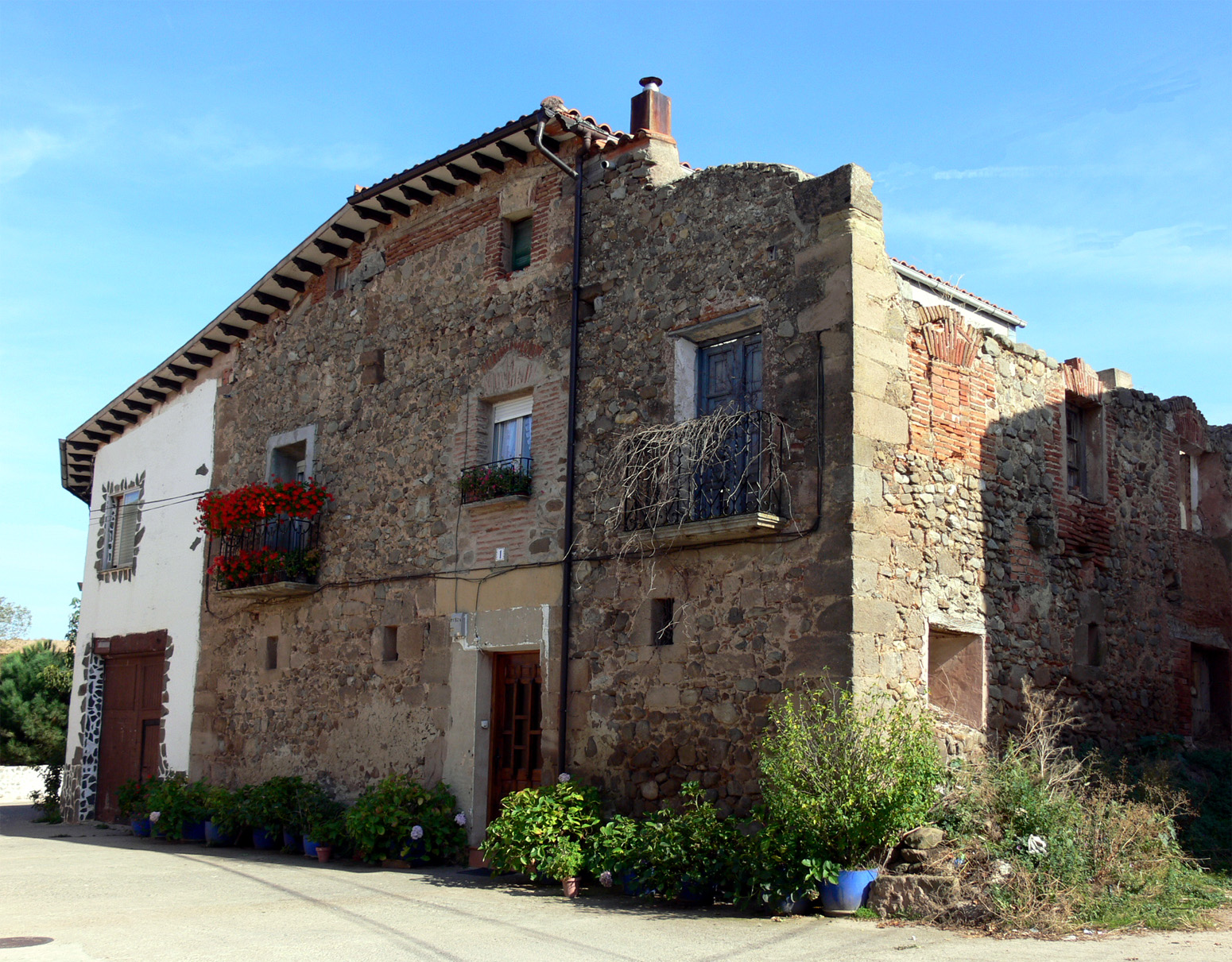 Manzanares de Rioja (España)